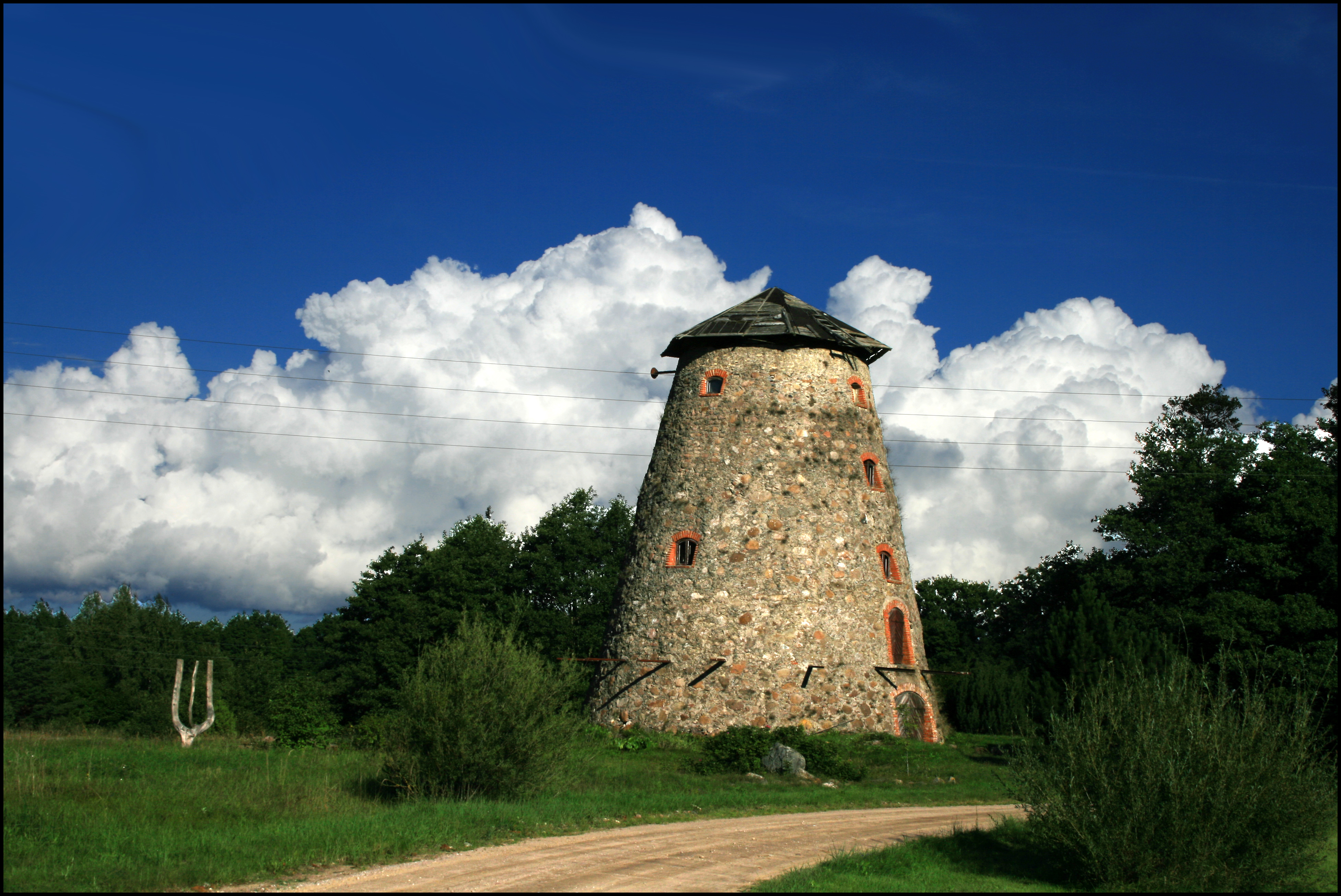 Medzes vējdzirnavas / windmill